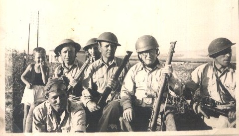 Afula's defenders in 1948